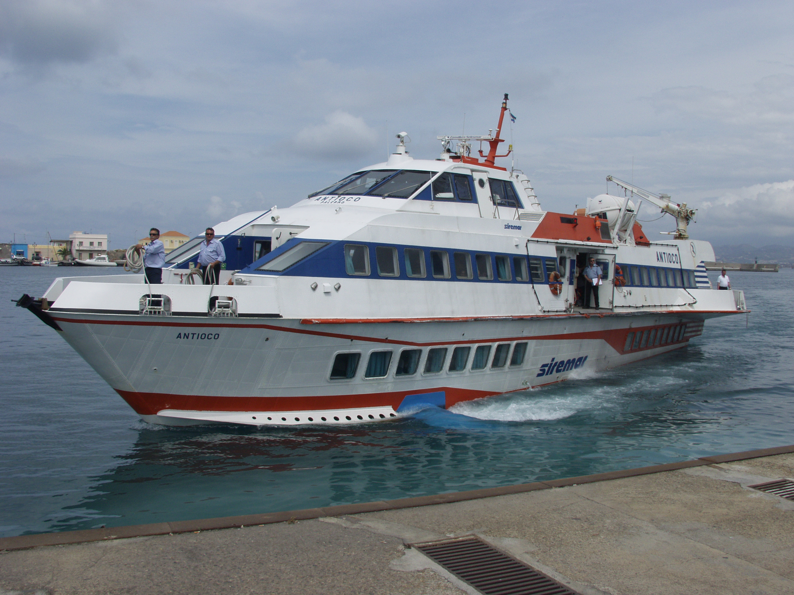 Hydrofoil 'Antioco' der Fährgesellschaft Sirmar im Hafen von Milazzo